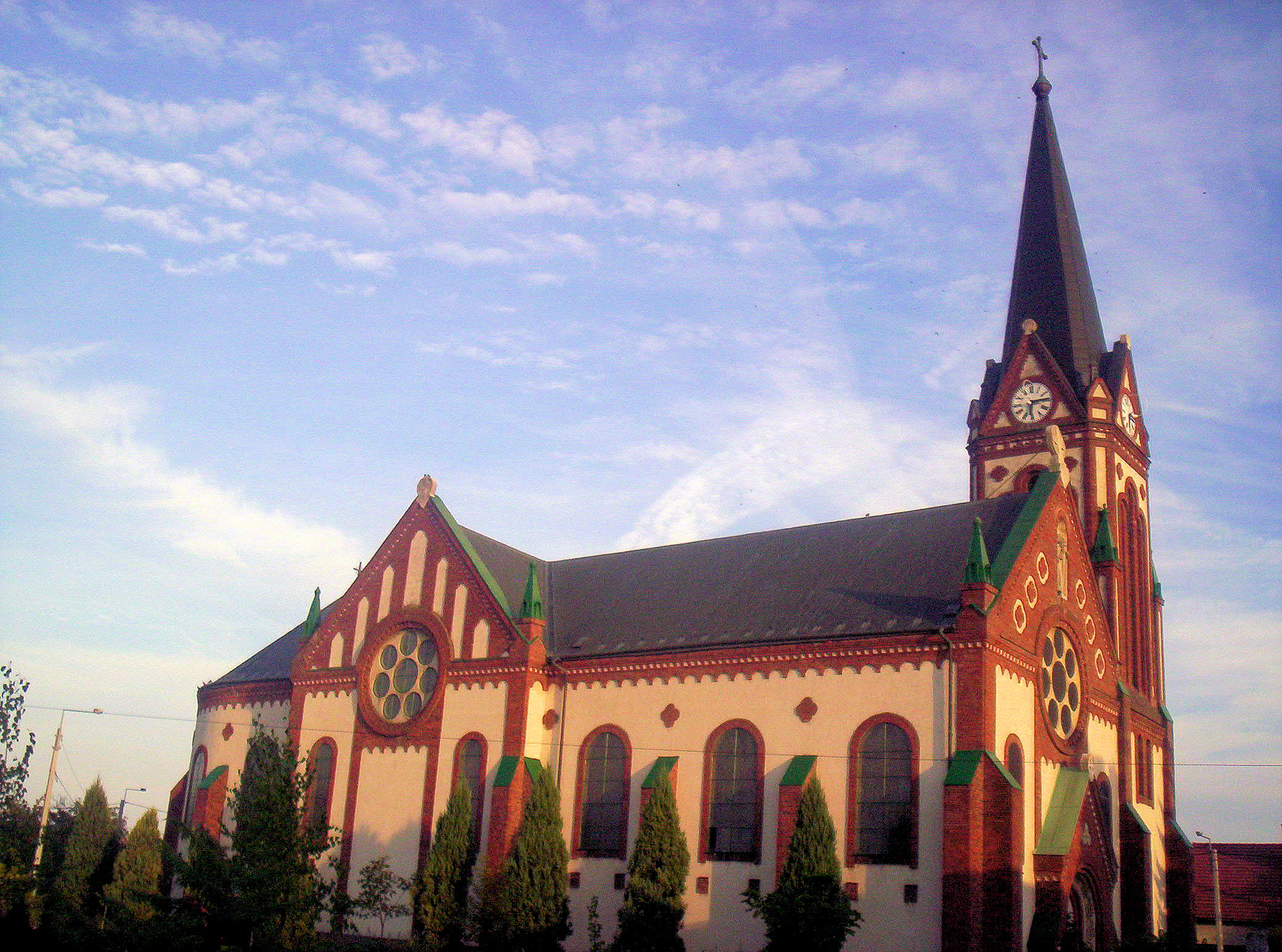 A fajszi, Szent István király tiszteletére emelt templom. Épült neoromán stílusban, 1910-ben. – photo taken by uploader User:Csanády in 2006.